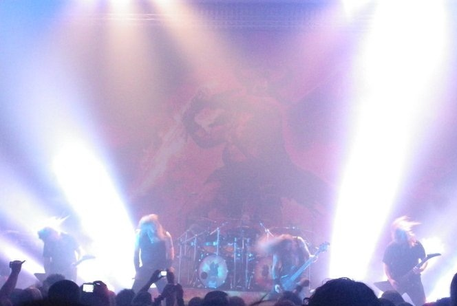 Amon Amarth en Santiago.